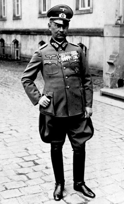 Friedrich Olbricht ADN-ZB/Archiv General Friedrich Olbricht war von 1940 bis 1944 Chef des Allgemeinen Heeresamtes im Oberkommando des Heeeres (OKH) der faschistischen deutschen Wehrmacht (OKW). Er hatte Verbindung zur Widerstandsbewegung. In der Nacht zum 21.7.1944 im Zusammenhang mit dem Attentatsversuch auf Hitler wurde er im Sitz des OKW in der Berliner Bendlerstrasse erschossen. (Aufn.:1938/Koch) Abgebildete Personen: Olbricht, Friedrich: General, Ritterkreuz (RK), Heer, 20. Juli 1944 hingerichtet, Deutschland (GND 11884332X)